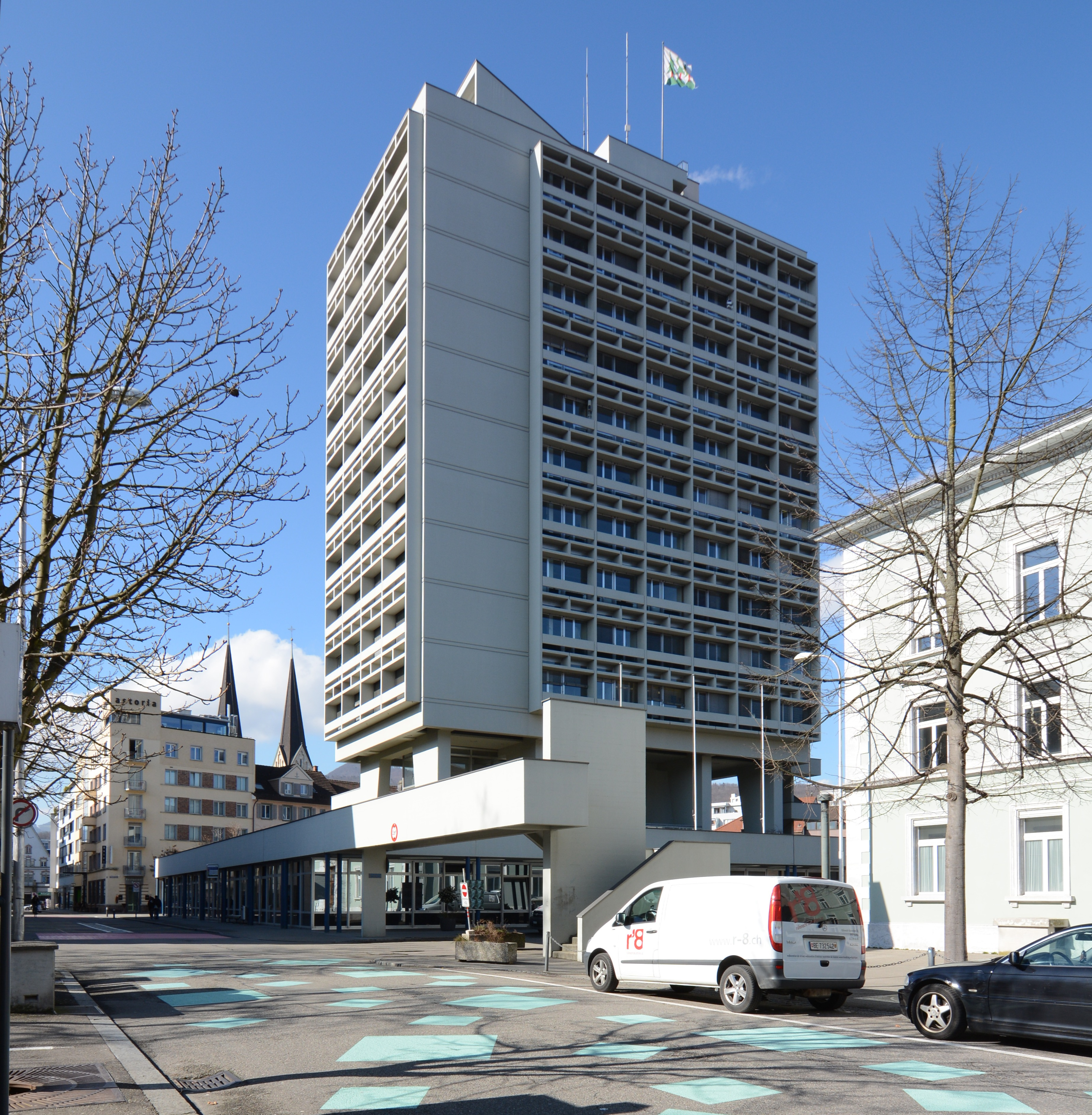 Stadthaus, Olten, 1963–67. Architekten: Alois Egger und Werner Peterhans